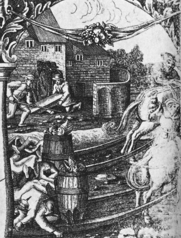 Blodbadstavlans serierutor, scen 4